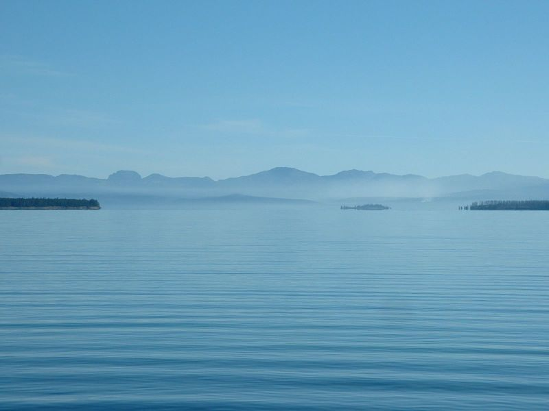 Yellowstone lake